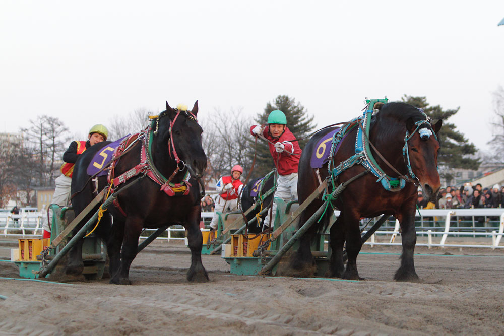 ばんえい記念でのゴール前の攻防